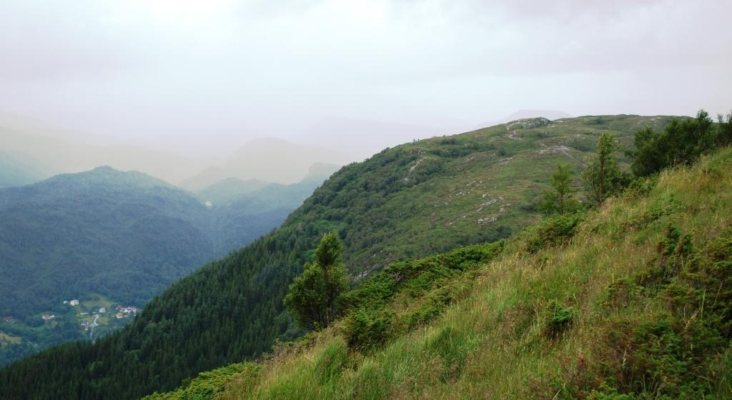 Ådnanipa Date=18.10.2009 Photo: Svein Harkestad, Bergen in Norway